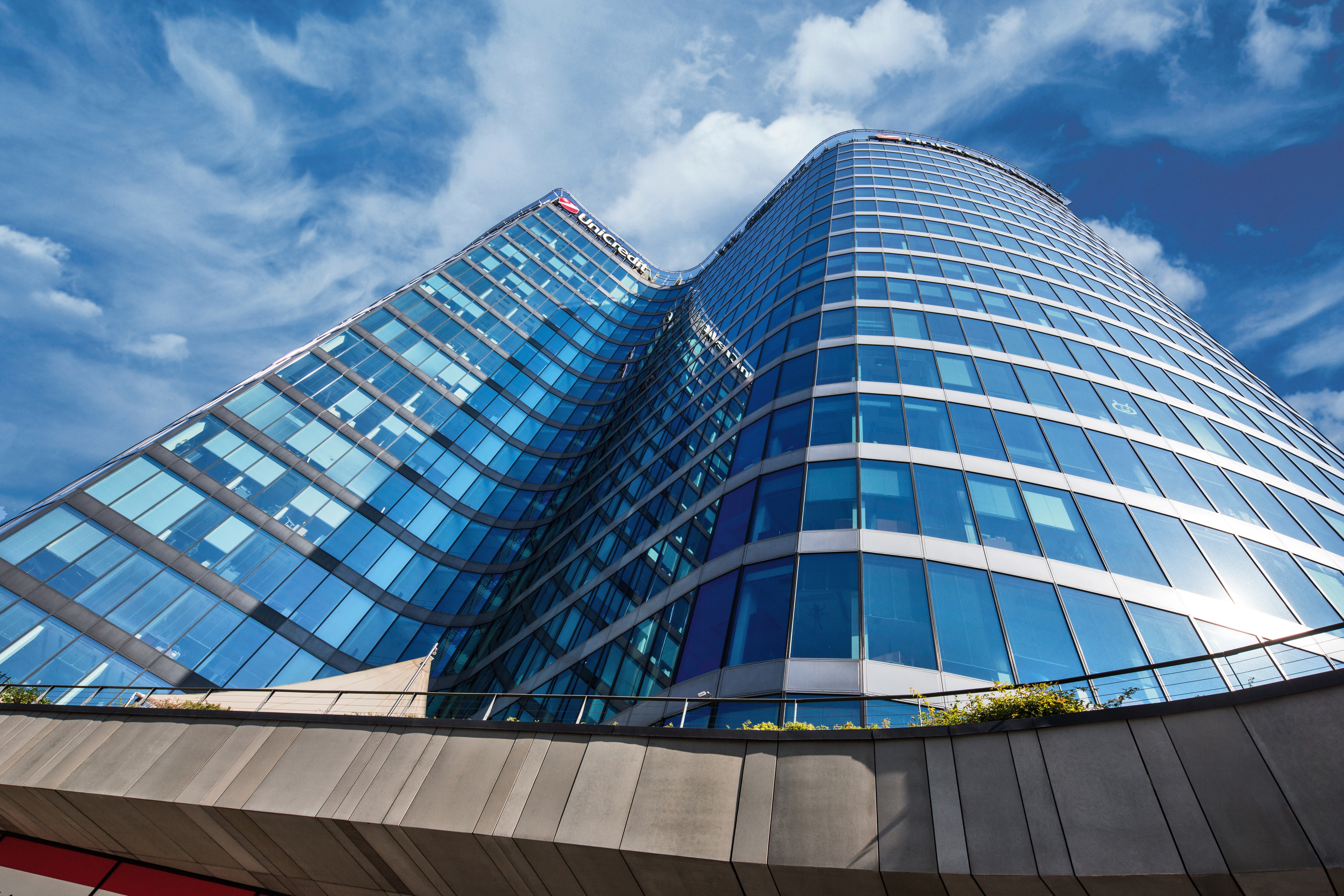 Centrála UniCredit Bank Czech Republic and Slovakia v Praze